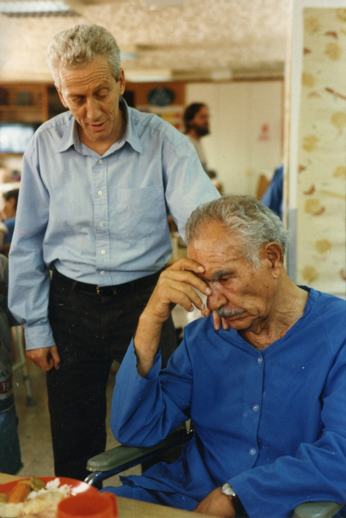 יוסי ידין ומוני מושונוב, בסרטו של חורחה גורביץ', "המקלחת", 1997